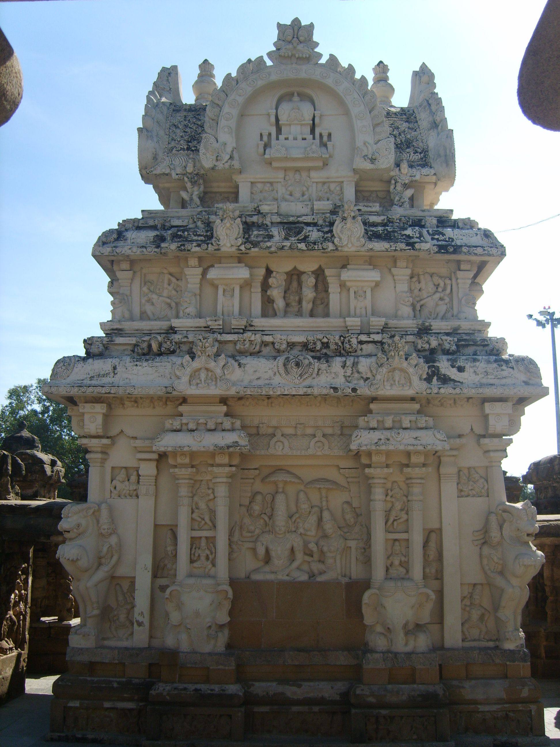 Kailasanathar Temple - Kanchipuram